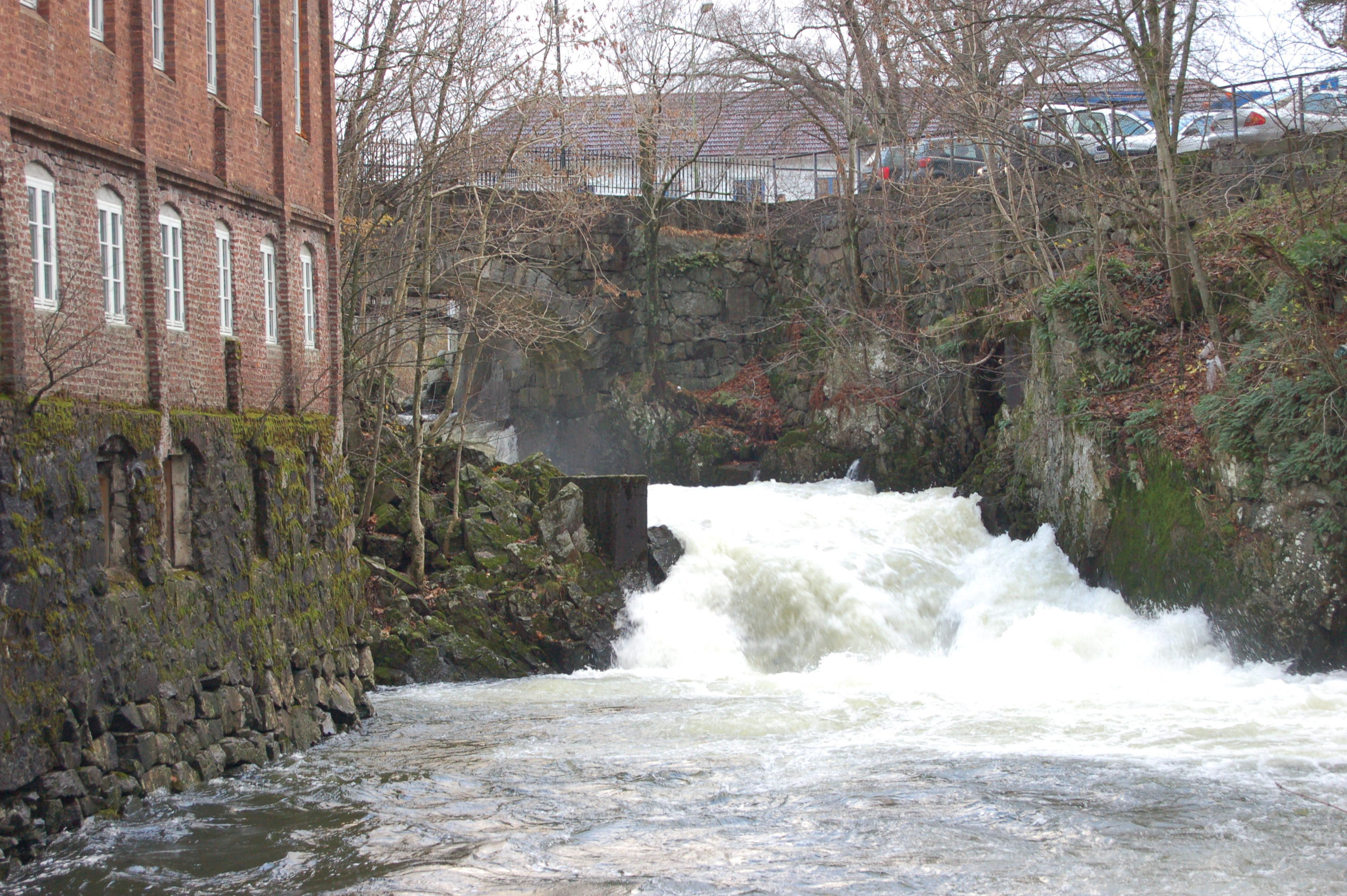 Figgjoelva in Rogaland, Norway